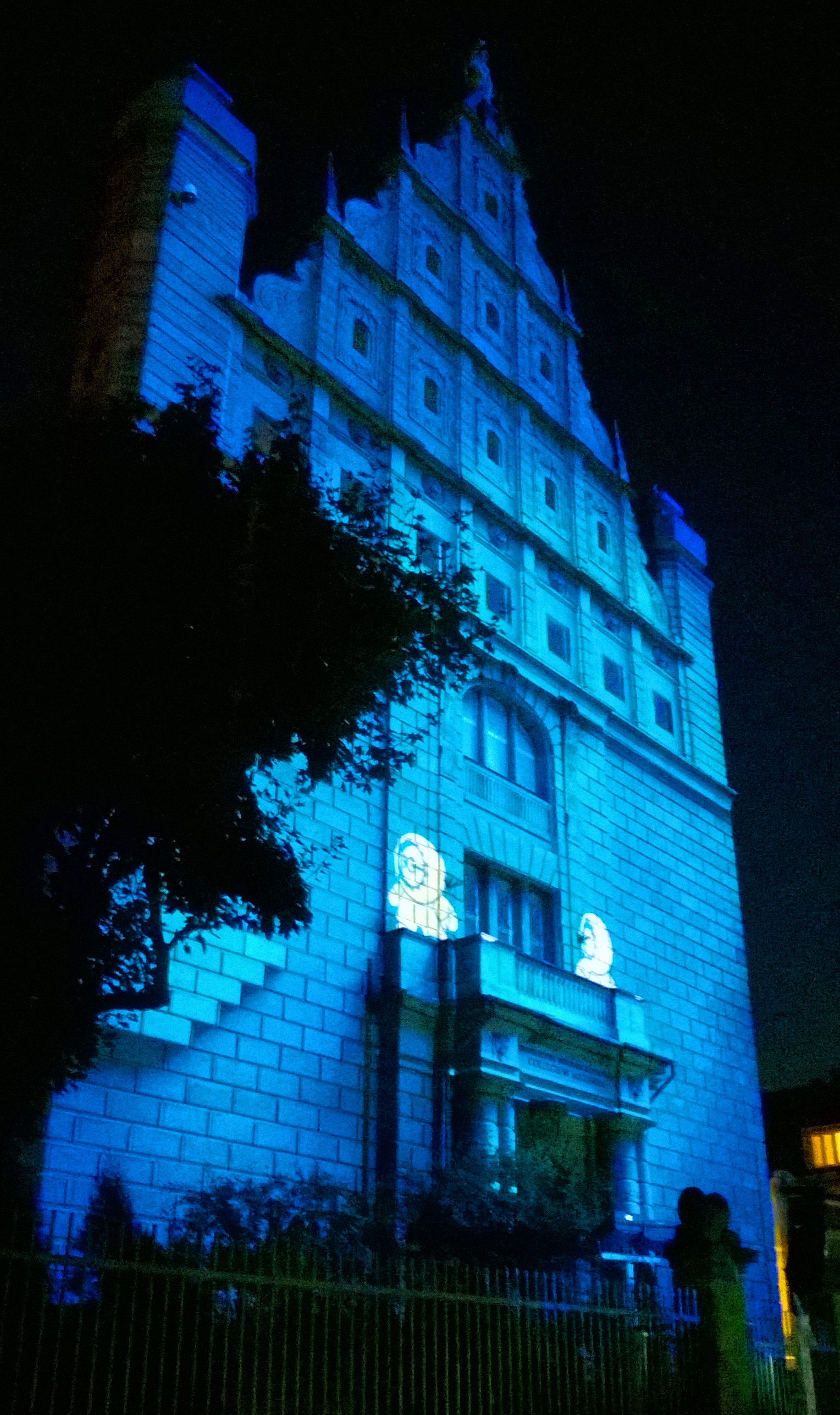 Bella Skyway Festival 2016 - projekcja "Anooki"